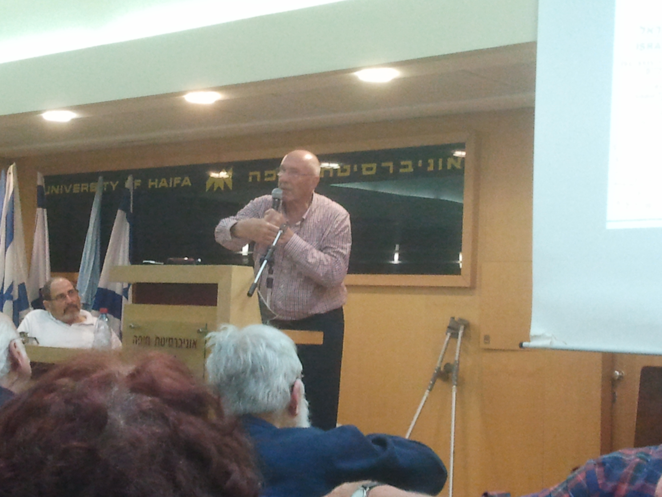 ארנון סופר הוא פרופסור אמריטוס ישראלי לגאוגרפיה ולמדעי הסביבה, מתמחה בנושאי מים ודמוגרפיה. בהרצאה באוניברסיטת חיפה לכבוד יציאת הספר החמישי של סקר הר מנשה, משמאל אדם זרטל